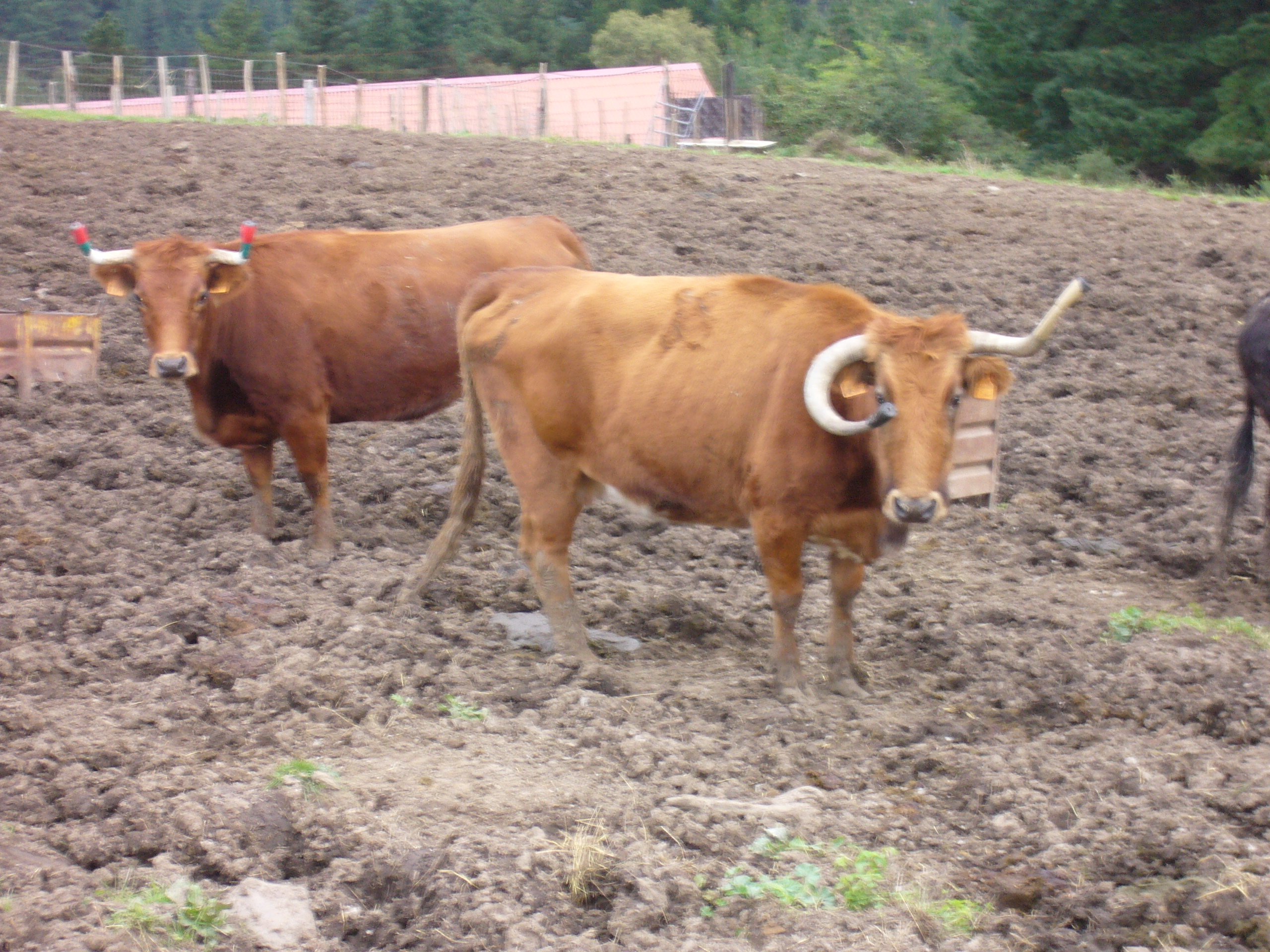 Nafar kastako behi suharrak Itziarren.